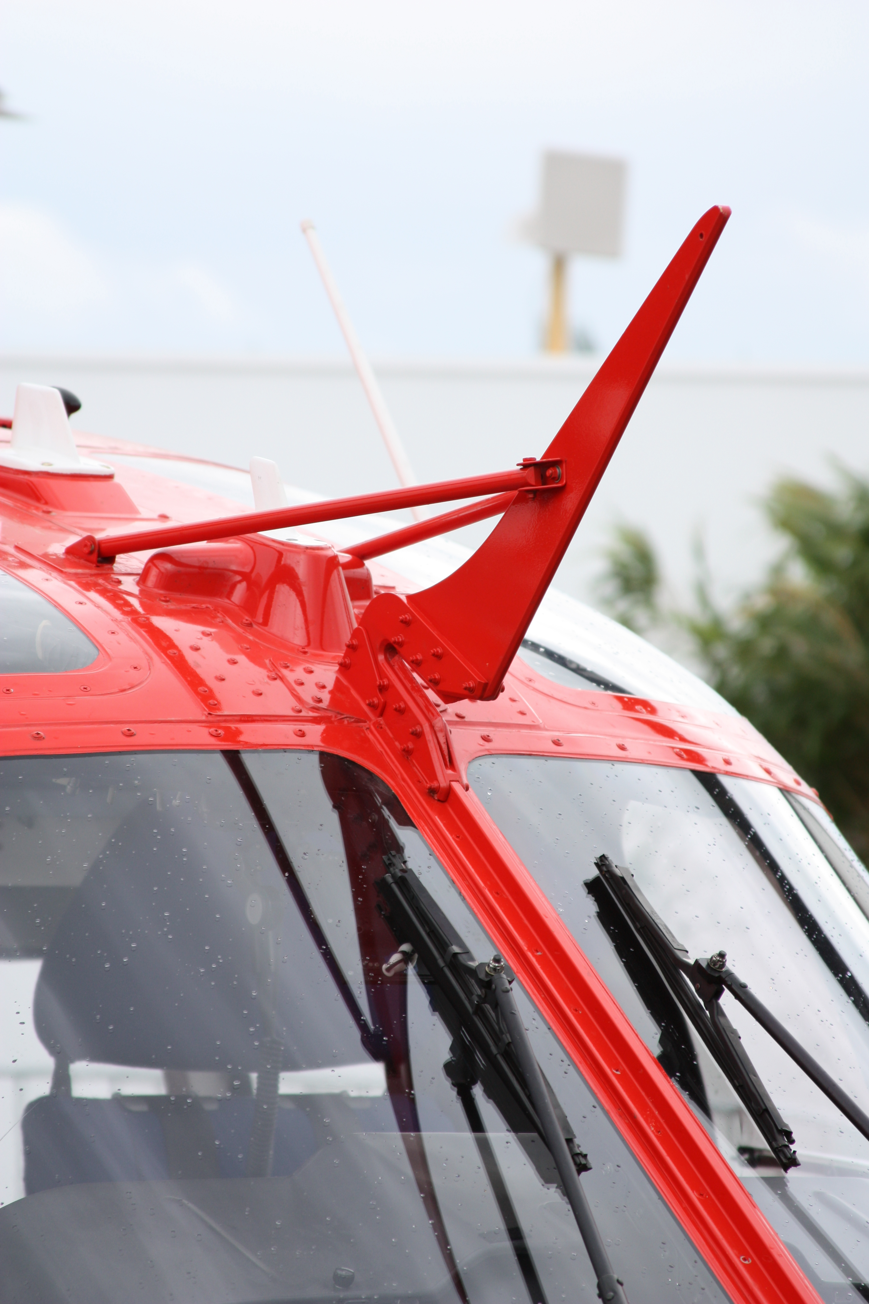 ILA 2010, am Samstag aufgenommen, meist erhöht von einer Leiter fotografiert